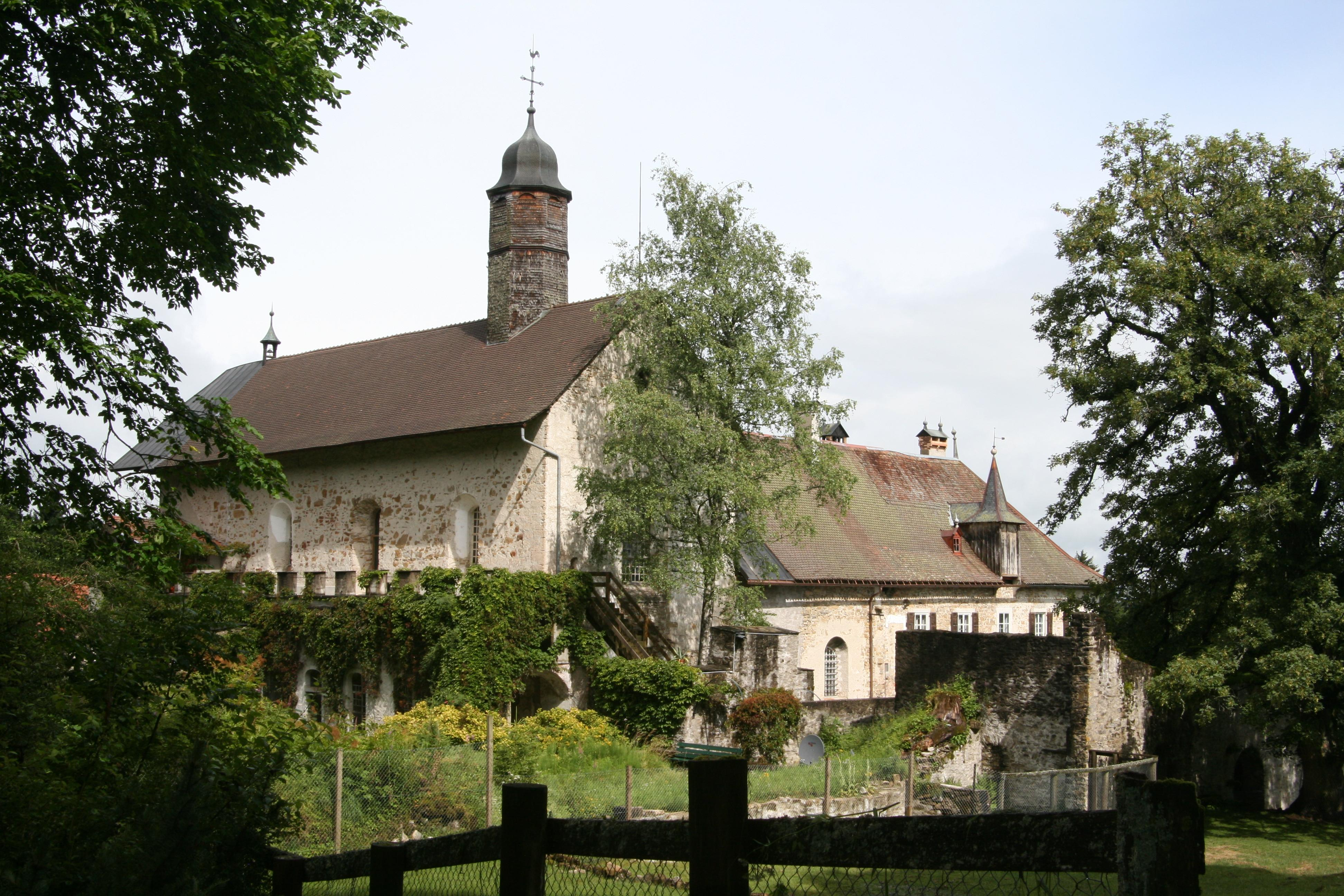 Chartreuse de la Part-Dieu en juillet 2007